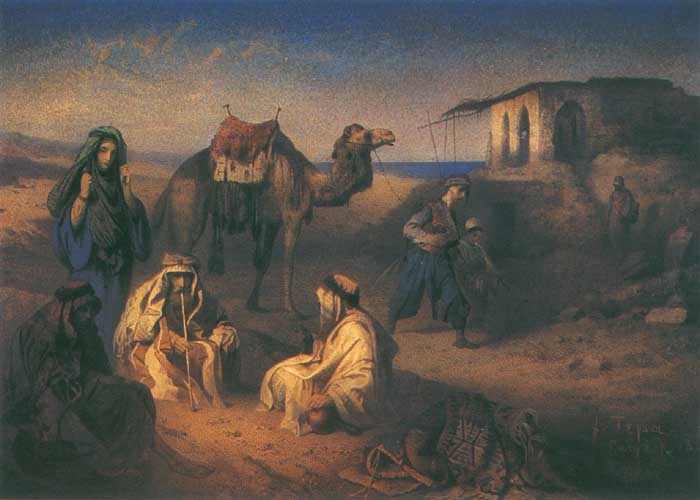 Franciszek Tepa (1829-1889) - polski malarz. Odpoczynek Beduinów koło opuszczonego karawanseraju w Syrii. 1864.